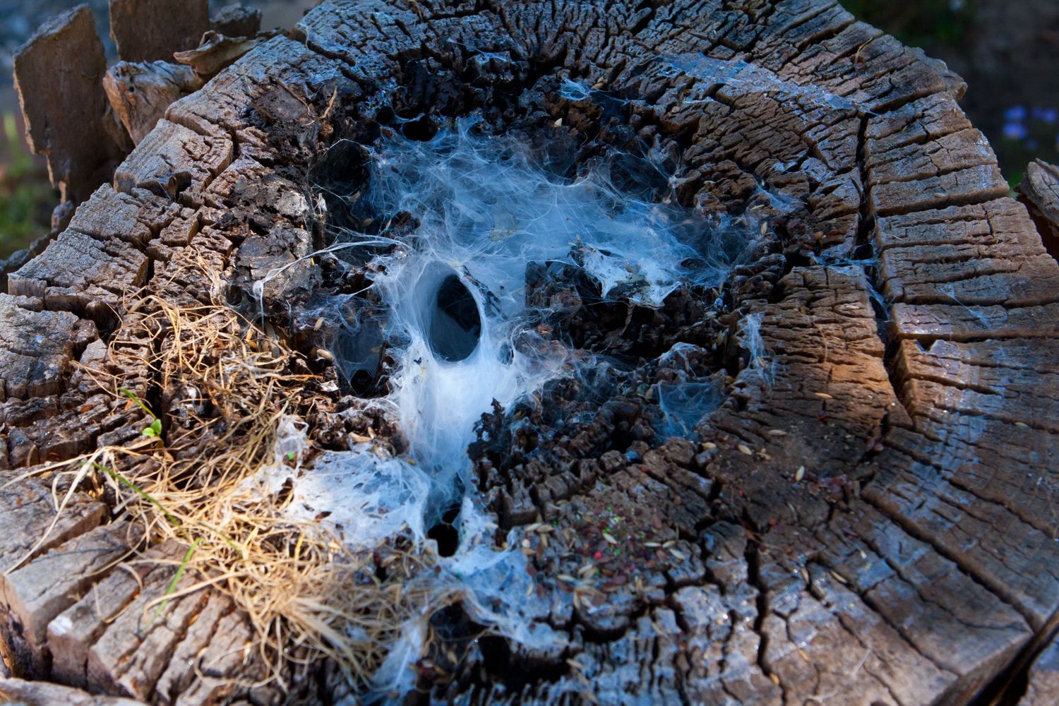 Nido de Araña Toro en un tronco cortado.